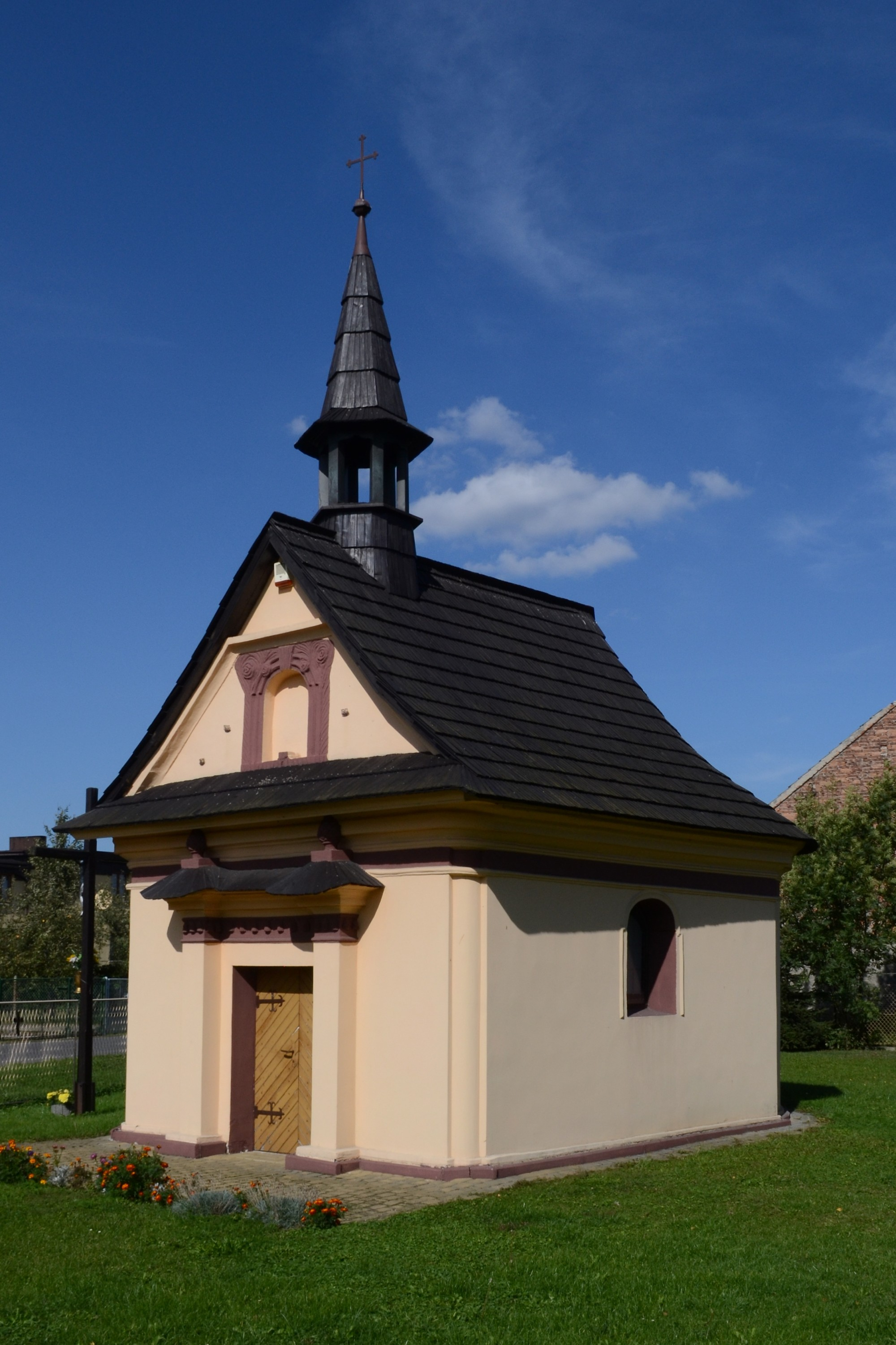 Kaplica p. w. Świętej Rodziny znajdująca się w Olzie, przy ulicy Wiejskiej Olza, ul. Wiejska (naprzeciw domu nr 5), Gorzyce